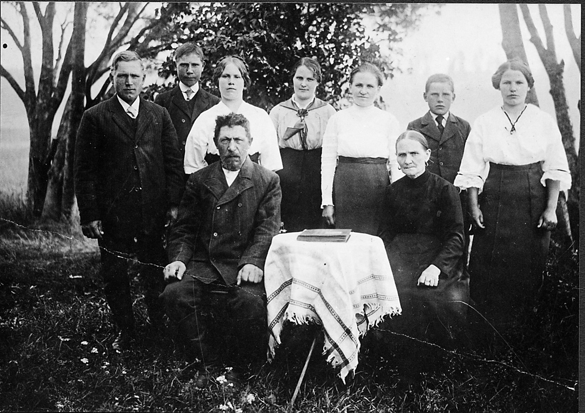 Fallbackan tilan pihalla vuonna 1914. Kuva otettiin perheen isän 60-vuotispäivillä. Istumassa syntymäpäiväsankari itse, Fredrik Viktor Fallström ja hänen vaimonsa Ida Lovisa. Seisomassa perheen kaikki lapset paitsi Frans Vilhelm. Vasemmalta Aksel, Teodor, Ester, Hilma, Amanda, Lennart ja Edit Fallström.